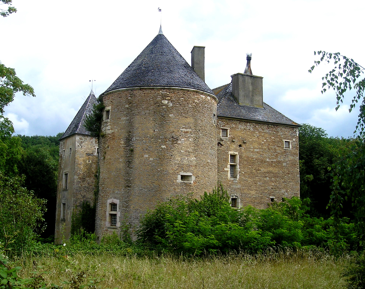 Le château-fort de Ruffey (Sennecey-le-Grand).